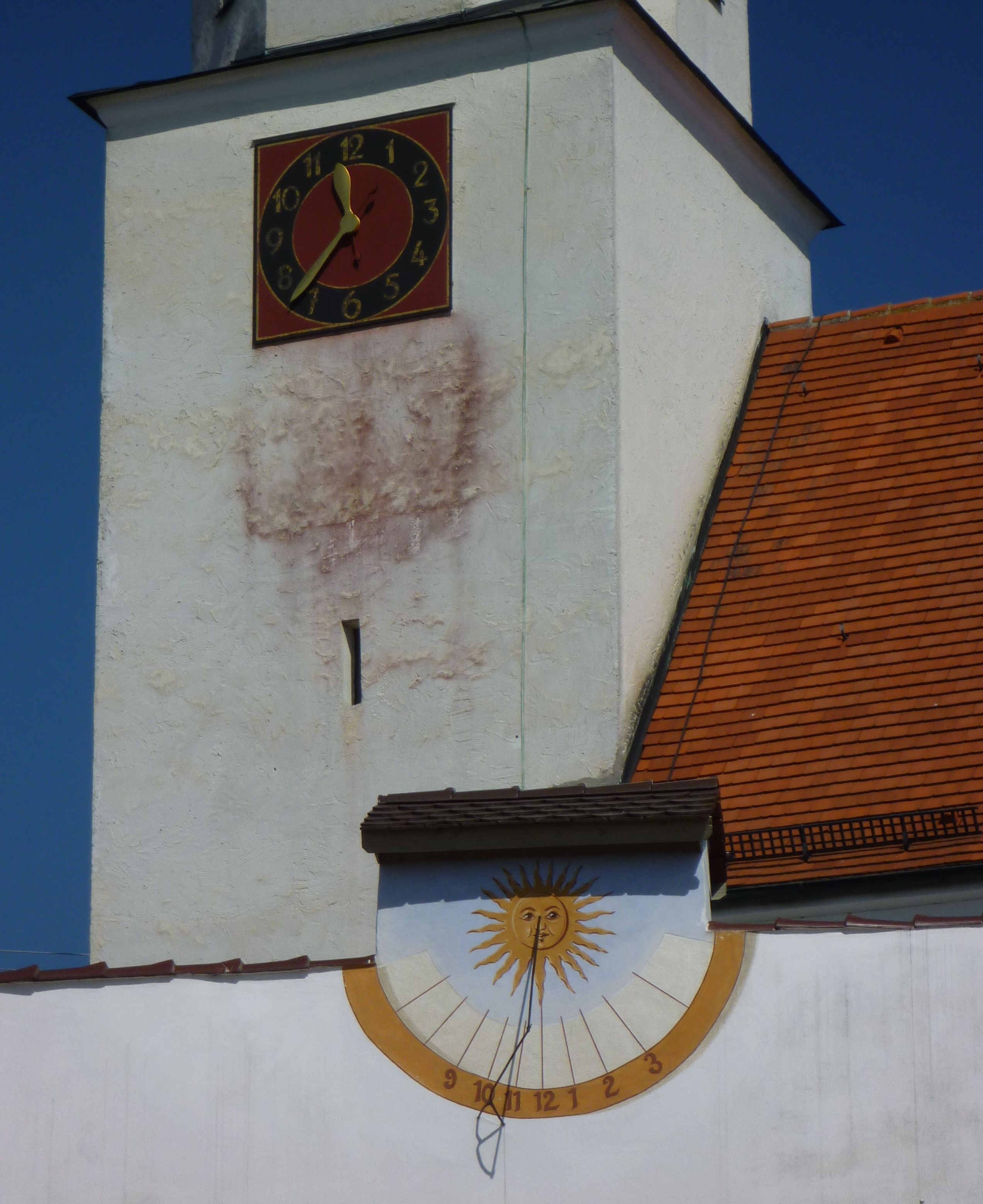 Öllingen - Turmuhr und Sonnenuhr